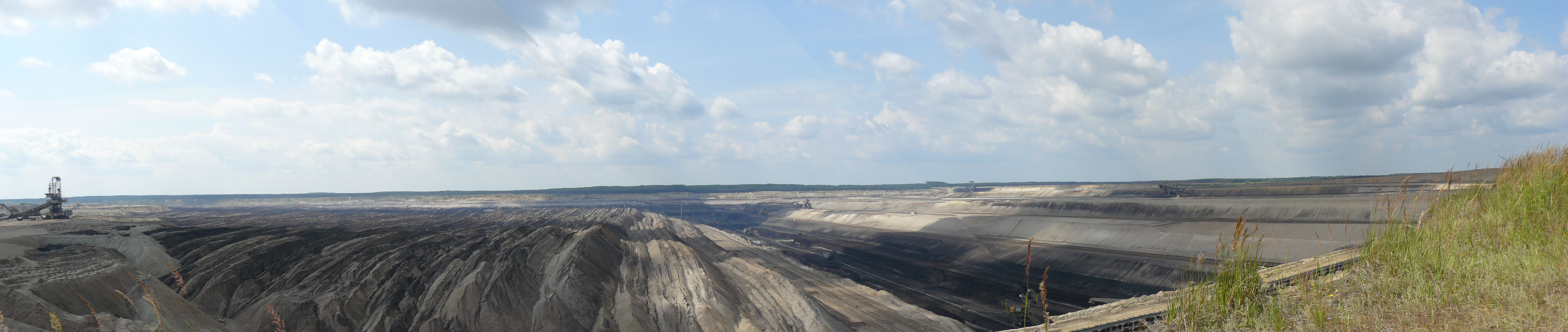 Braunkohleförderung im Tagebau Welzow Süd / Brandenburg / Germany